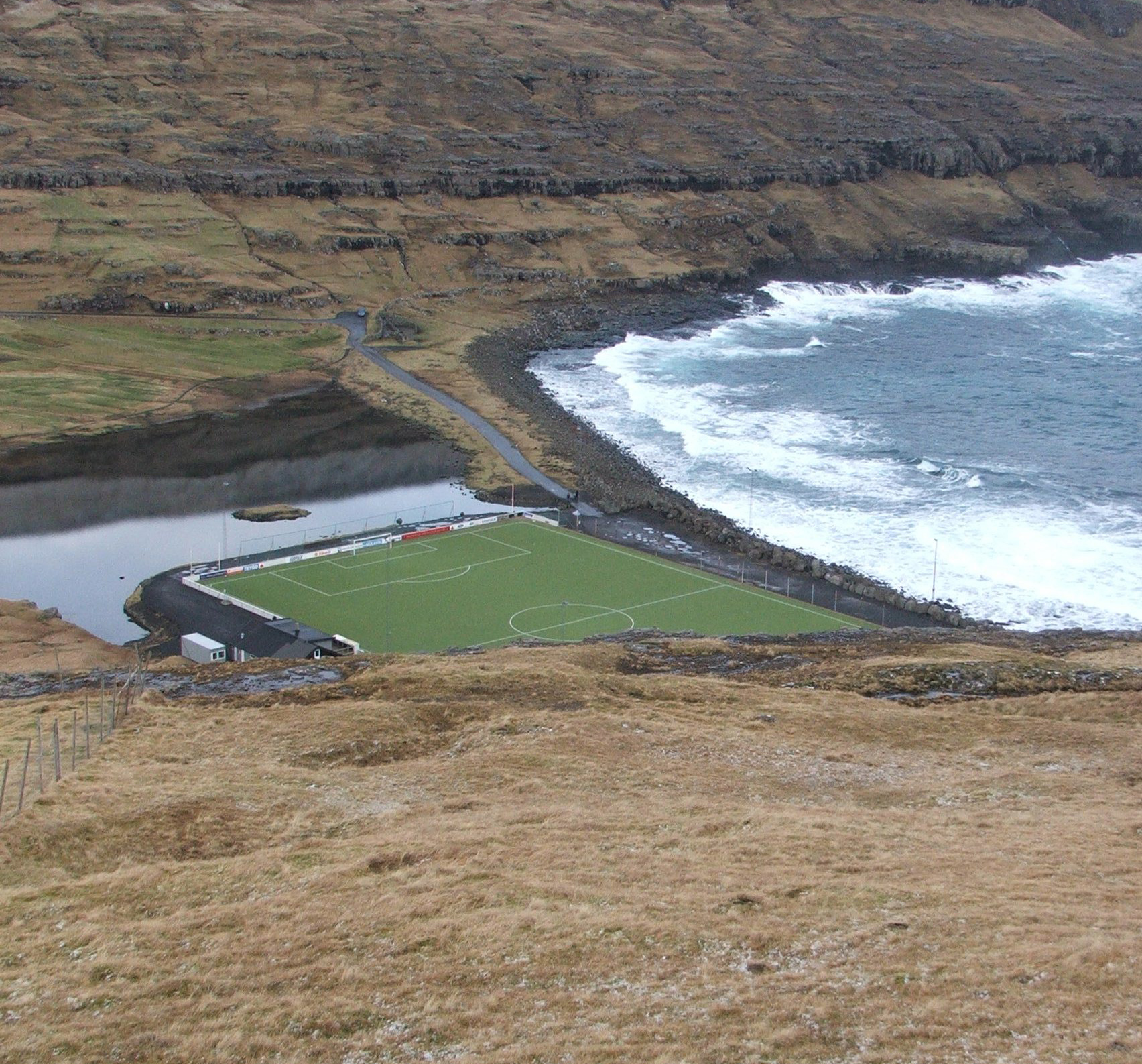 Färöischer Fußballplatz, der in einen Fjord hineingebaut wurde